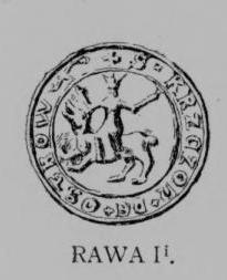 Rawicz Ii